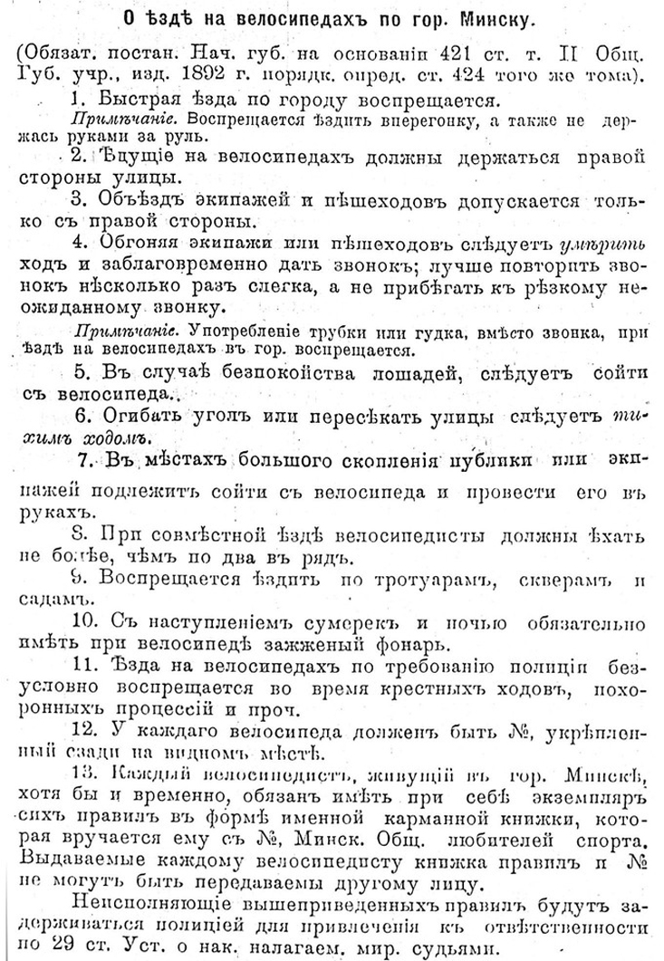 О езде на велосипедах по городу Минску (Обязательное постановление начальника губерни на основании 421 статьи тома II Общ. Губ. учр., изд. 1892 год порядок определяет статья 424 того же тома). 1. Быстрая езда по городу воспрещается. Примечание: Воспрещается ездить вперегонку, а также не держась руками за руль. 2. Едущие на велосипедах должны держаться правой стороны улицы. 3. Объезд экипажей и пешеходов допускается только с правой стороны. 4. Обгоняя экипажи или пешеходов следует усмирить ход и заблоговременно дать звонок; лучше повторить звонок несколько раз слегка, а не прибегать к резкому неожиданному звонку. Примечание: Употребление трубки или гудка, вместо звонка, при езде на пелосипедах в городе воспрещается. 5. В случае беспокойства лошадей следует сойти с велосипеда. 6. Огибать угол или пересекать улицы следует тихим ходом. 7. В местах большого скопления публики или экипажей подлежит сойти с велосипеда и провести его в руках. 8. При совместной езде велосипедисты должны ехать не более, чем по два в ряд. 9. Воспрещается ездить по тротуарам, скверам и садам. 10. С наступлением сумерек и ночью обязательно иметь при велосипеде зажженный фонарь. 11. Езда на велосипедах по требованию полиции безусловно воспрещается во время крестных ходов, похоронных процессий и проч. 12. У каждого велосипеда должен быть №, укрепленный сзади на видном месте. 13. Каждый велосипедист, живущий в городе Минске, хотя бы и временно, обязан иметь при себе экземпляр сих правил в форме именной карманной книжки, которая вручается ему с № Минского общества любителей спорта. Выдаваемые каждому велосипедисту книжка правил и № не могут быть передаваемы другому лицу. Неисполняющие вышеприведенных правил будут задерживаться полицией для привлечения к ответственности по 29 ст. Уст. о нак. налагаем. мир. судьями.